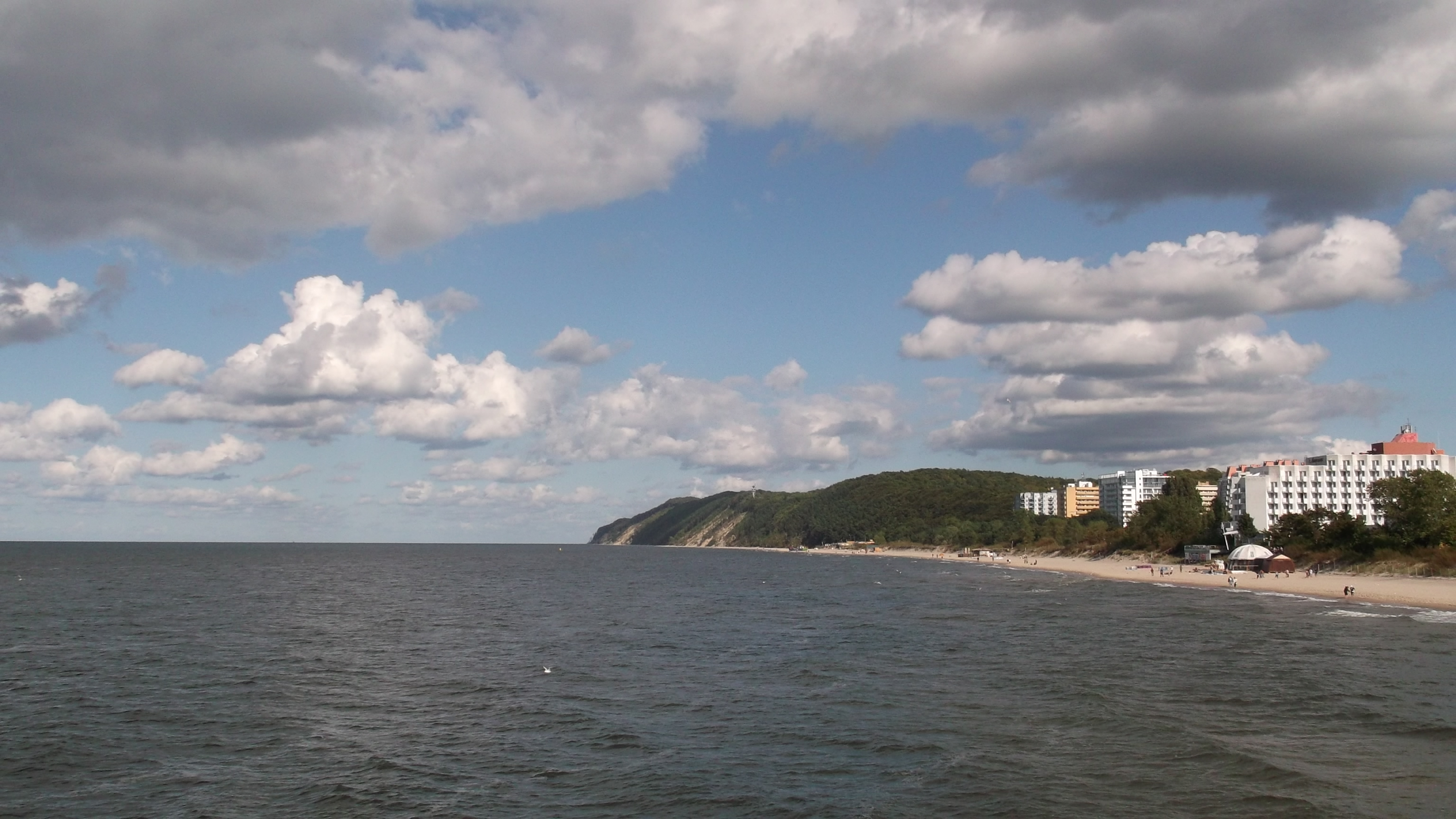 Międzyzdroje, plaża widziana z mola